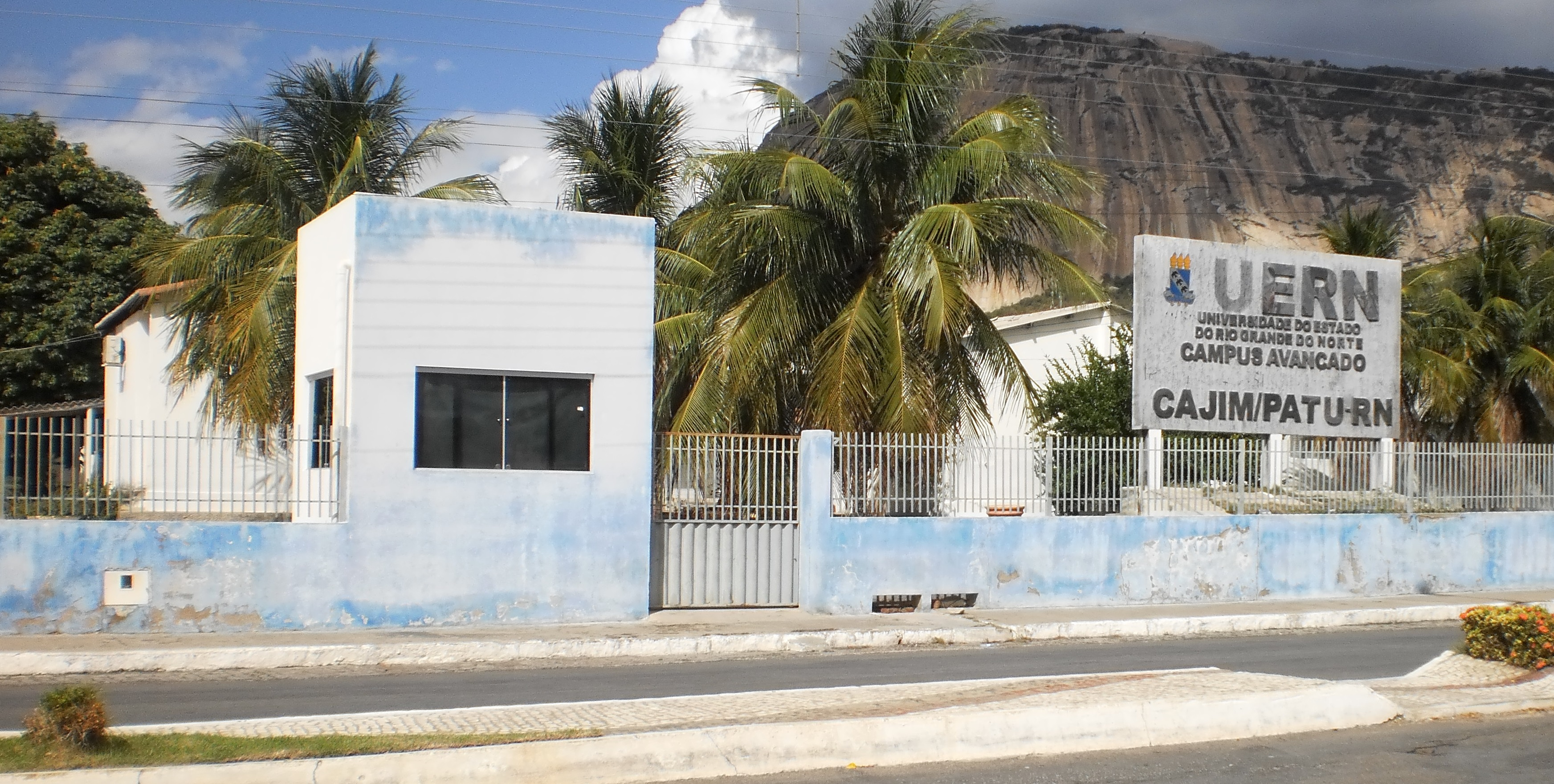 Entrada do Câmpus da Universidade do Estado do Rio Grande do Norte Professor João Ismar de Moura (UERN/CAJIM) na Avenida Lauro Maia em Patu, Brasil.